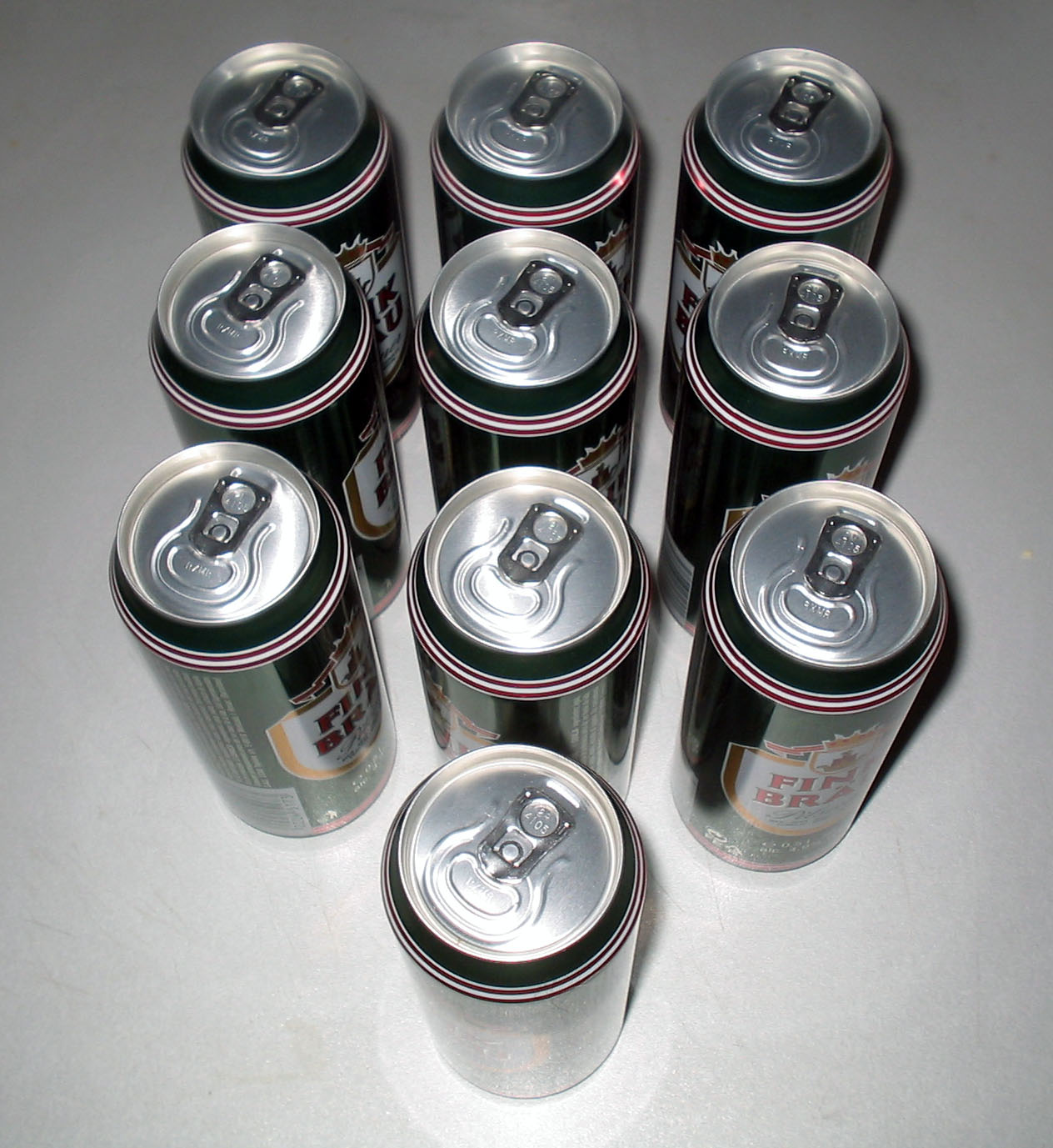 Bierblikjes dusdanig neergezet dat het talpa logo zichtbaar wordt. De zender gebruikt dit effect met verschillende andere objecten. Uiteraard geen copyright over het neerzetten en fotograferen van bierblikjes